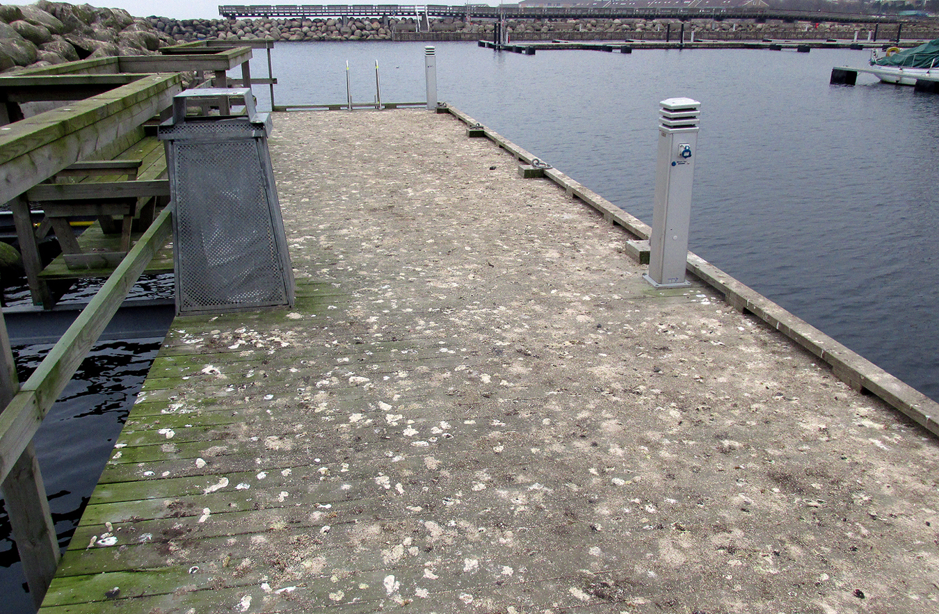 Avföring/Fågelspillning från måsar och trutar på en brygga i Ystads småbåtshamn 2015.